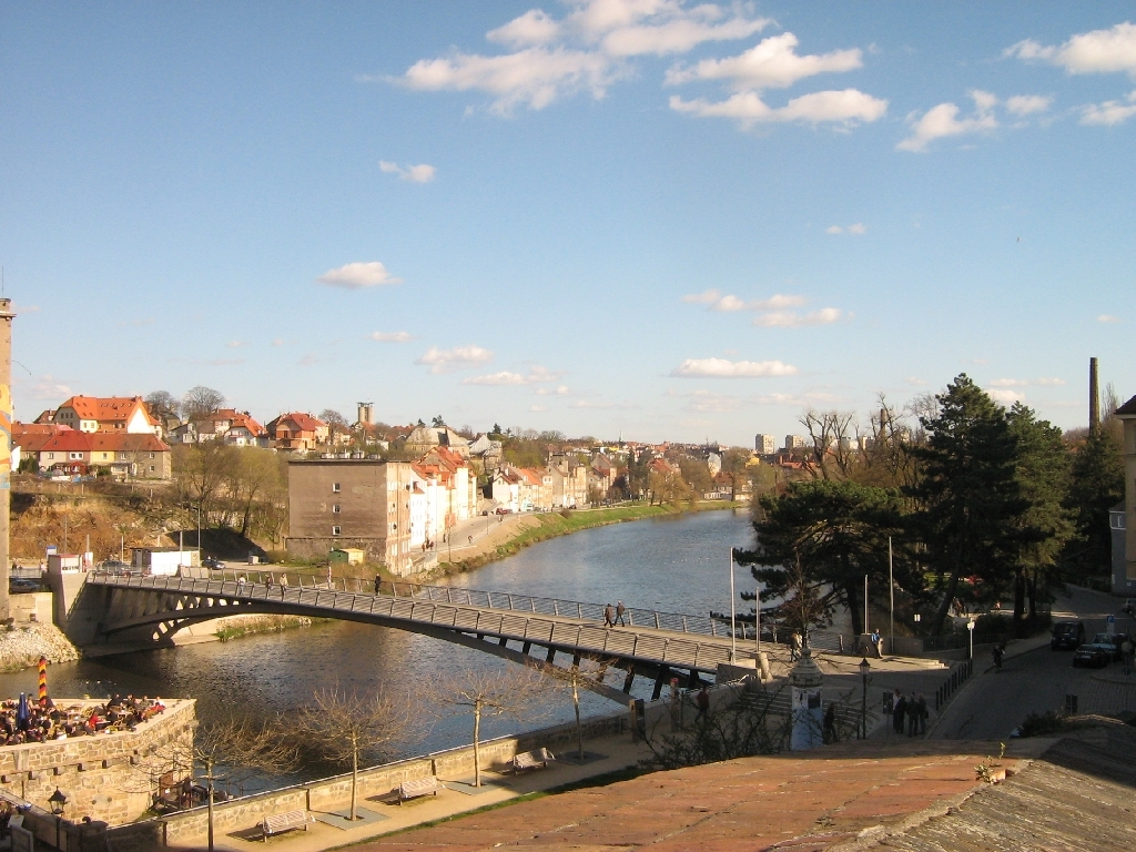 Die Lausitzer Neiße in Görlitz (Oberlausitz, Sachsen). Blick auf Zgorzelec in Polen)